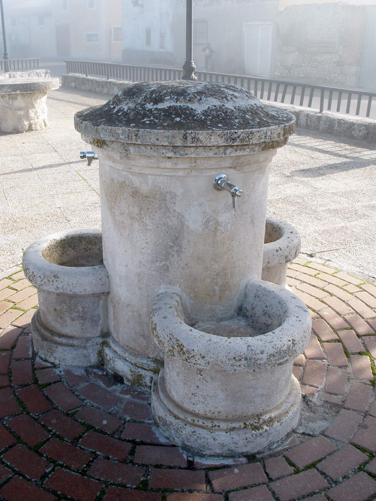 Portillo (Valladolid)